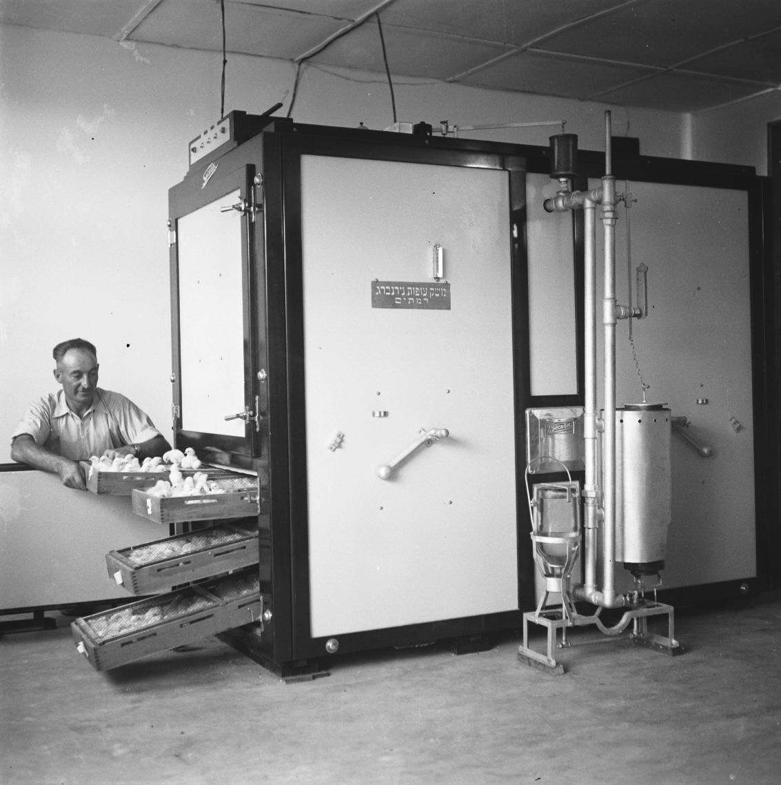 אוסף צילומים של הצלם זולטן קלוגר טווח מספרי התשלילים 30008 - 30060: אינקובטור, רמתיים